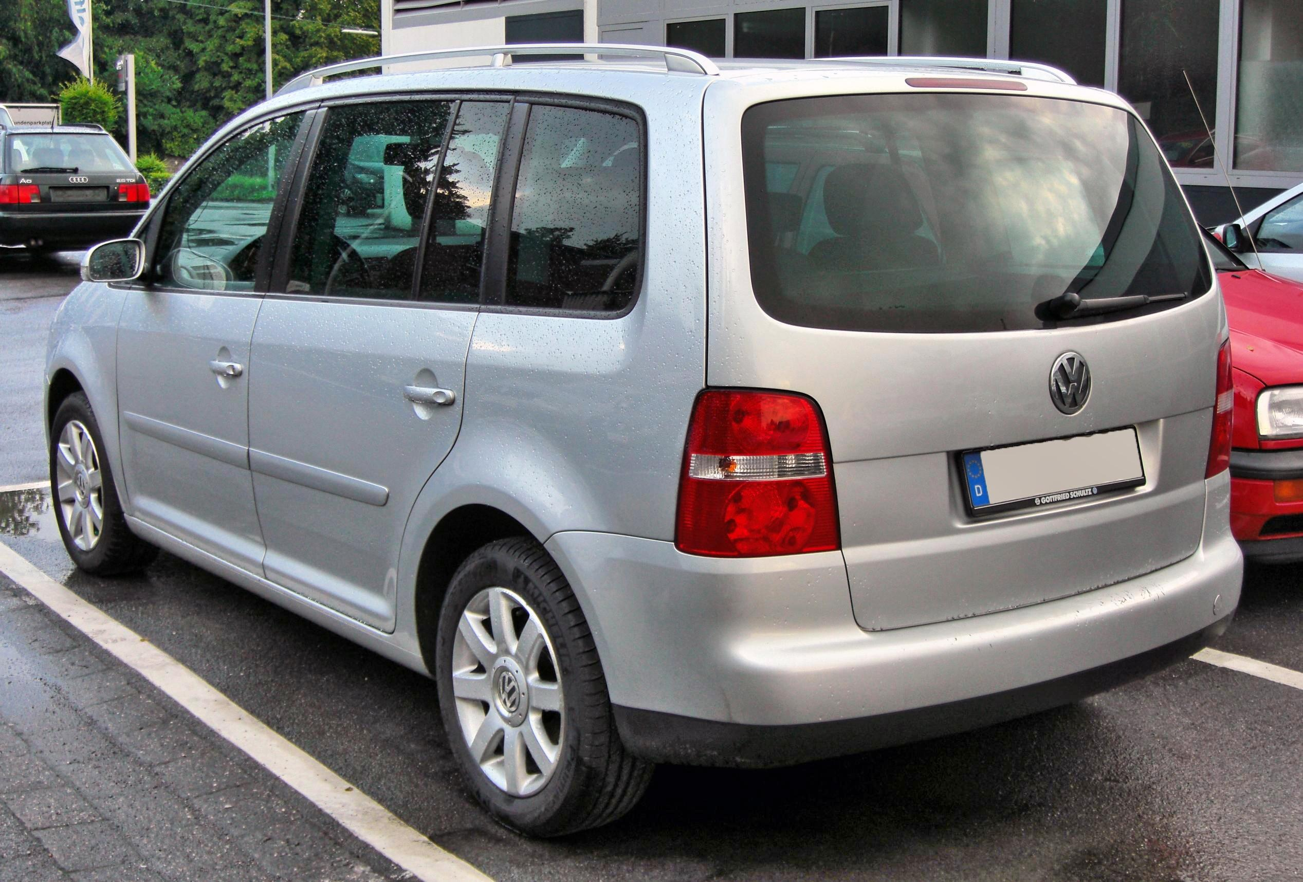 VW Touran